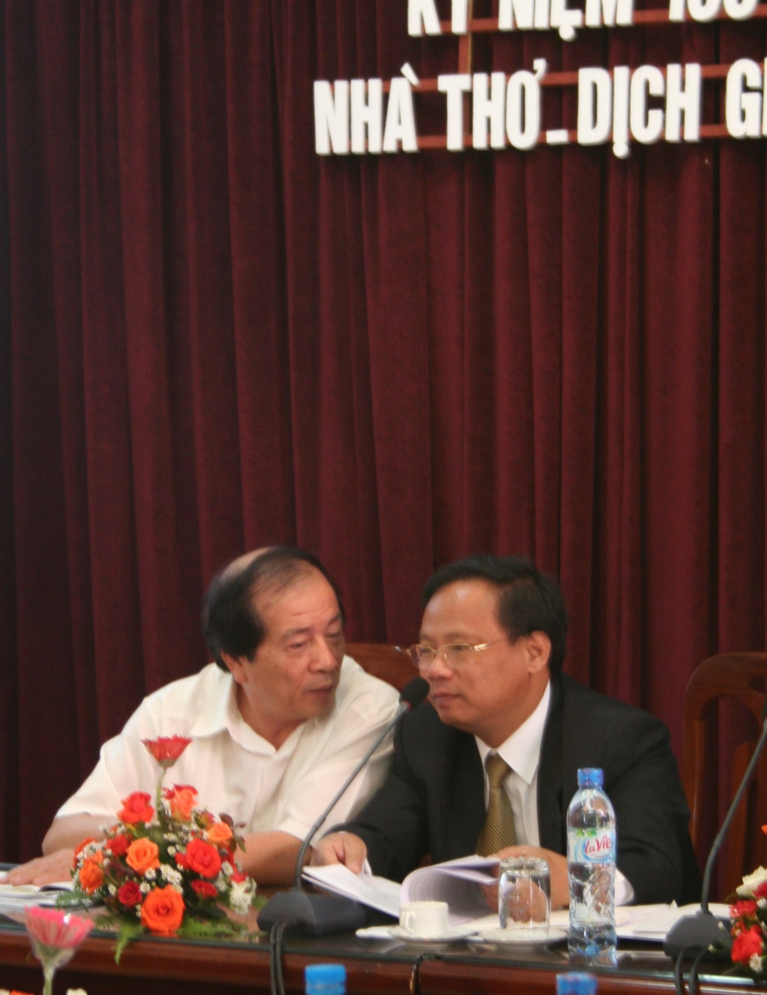 Nhà thơ Hữu Thỉnh và PGS.TS. Phan Trọng Thưởng - Viện trưởng Viện Văn học (Việt Nam) đang trao đổi trong Lễ tưởng niệm và Hội thảo khoa học kỷ niệm 100 năm sinh và 40 năm mất của nhà thơ Nam Trân (1907-1967), tổ chức ngày 18 tháng 10 năm 2007 tại Hà Nội với sự phối hợp của Hội Nhà văn Việt Nam và Viện Văn học.